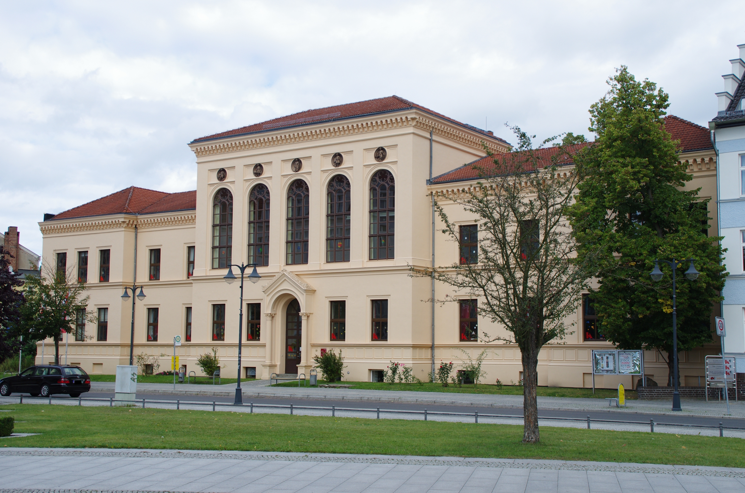 Fürstenwalde in Brandenburg. In dem Haus befindet sich eine Schule.